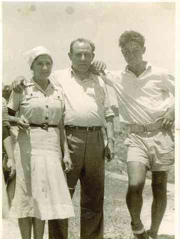 שרה ושאול מאירוב עם בנם גור גור מאירוב/ שאול אביגור (מאירוב)/ שרה אביגור (מאירוב) ראה pic1594 27